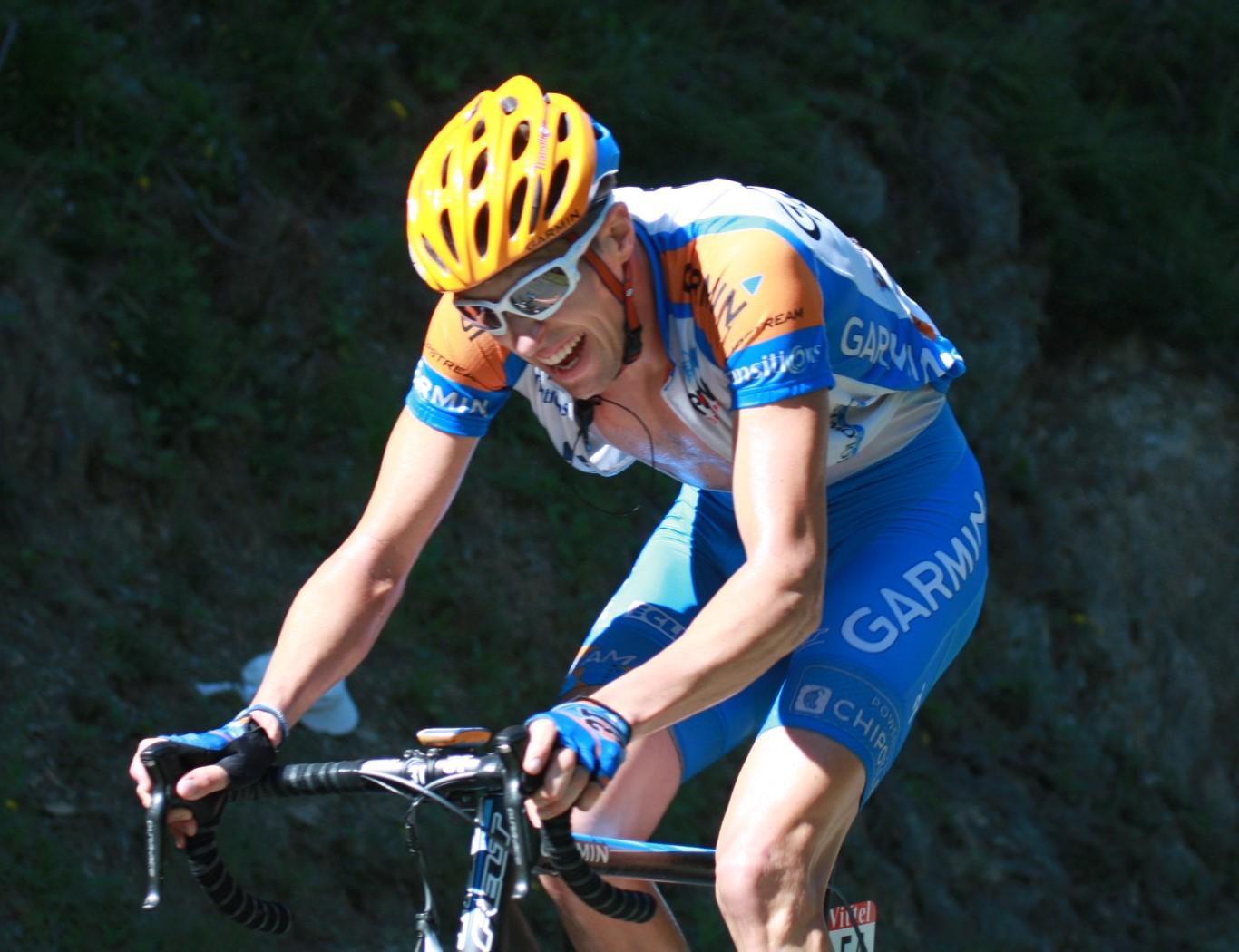 5699 hesjedal